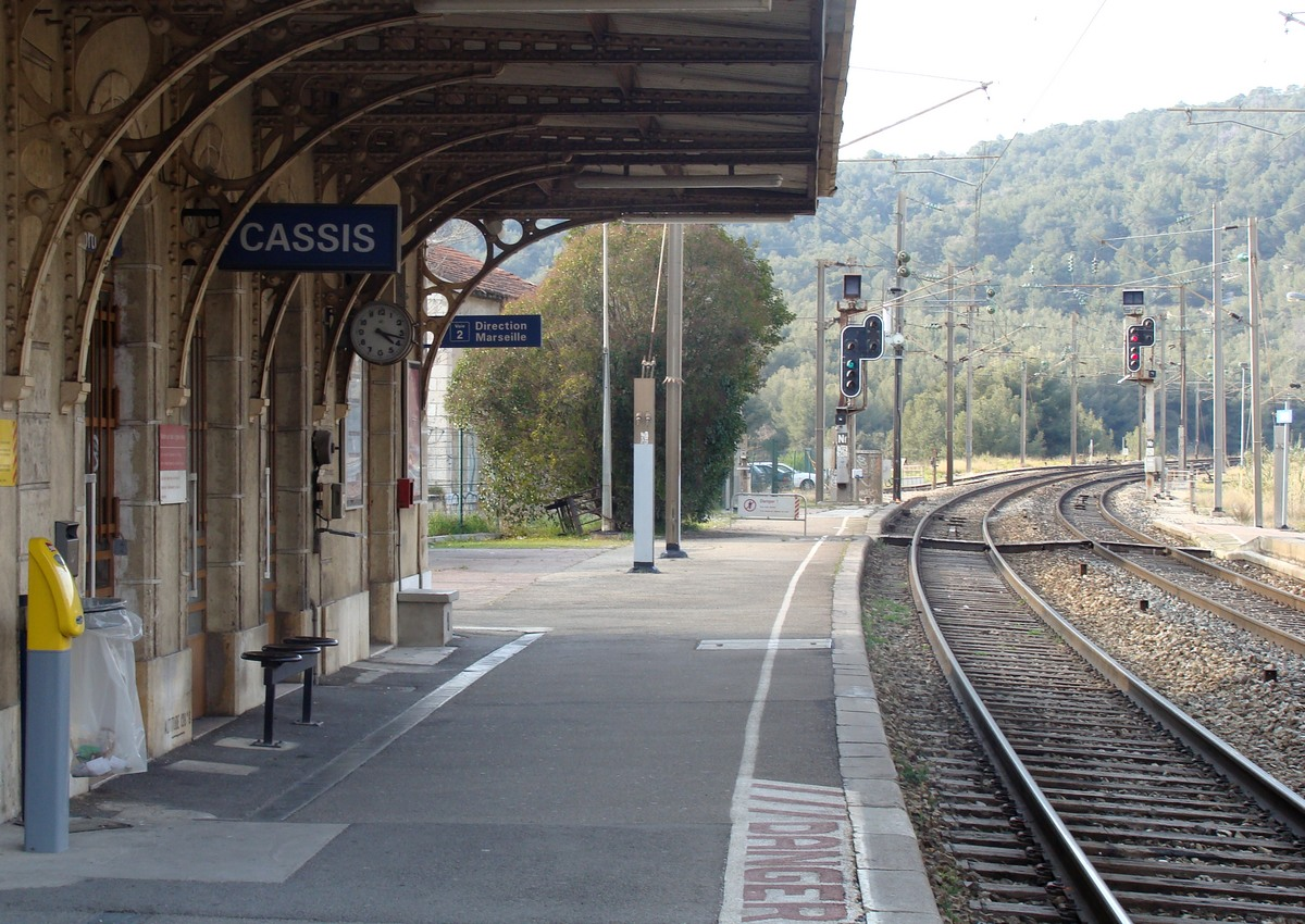 La gare de Cassis, vue côté voies.